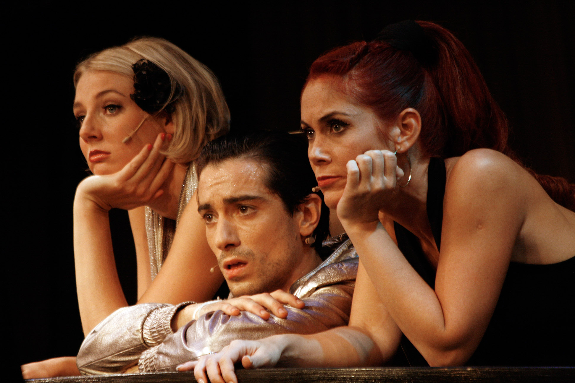 Bettina Mönch, Stefano Bernardin und Adriana Zartl während der Premiere der zweiten Saison des Musicals Ti Amo im Metropol in Wien.